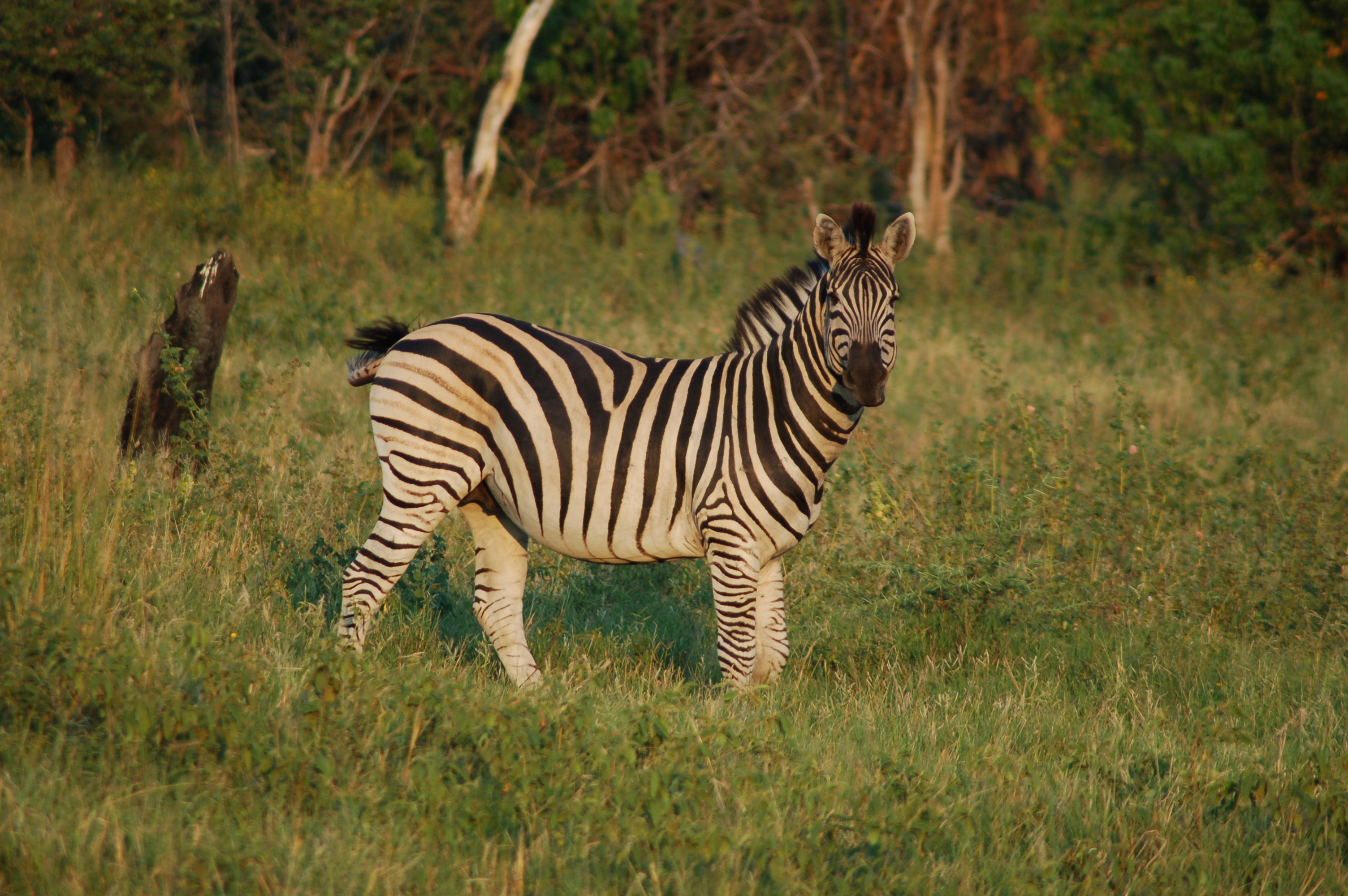 Okavango Delta, Botswana